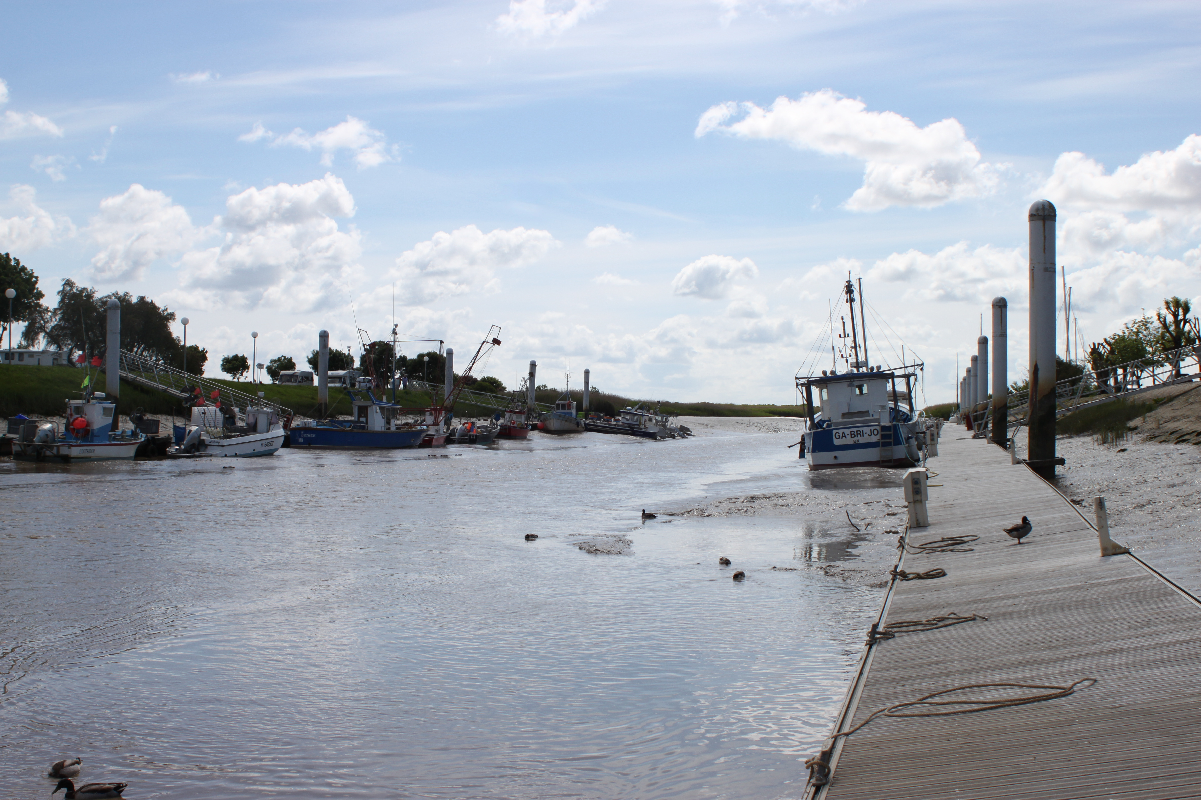 Port à marée basse, Fr-17-Mortagne-sur-Gironde.